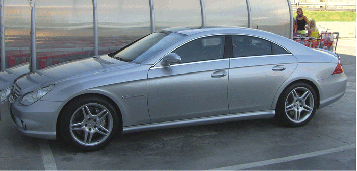 eigen foto, gemaakt in Kroatie in 2005